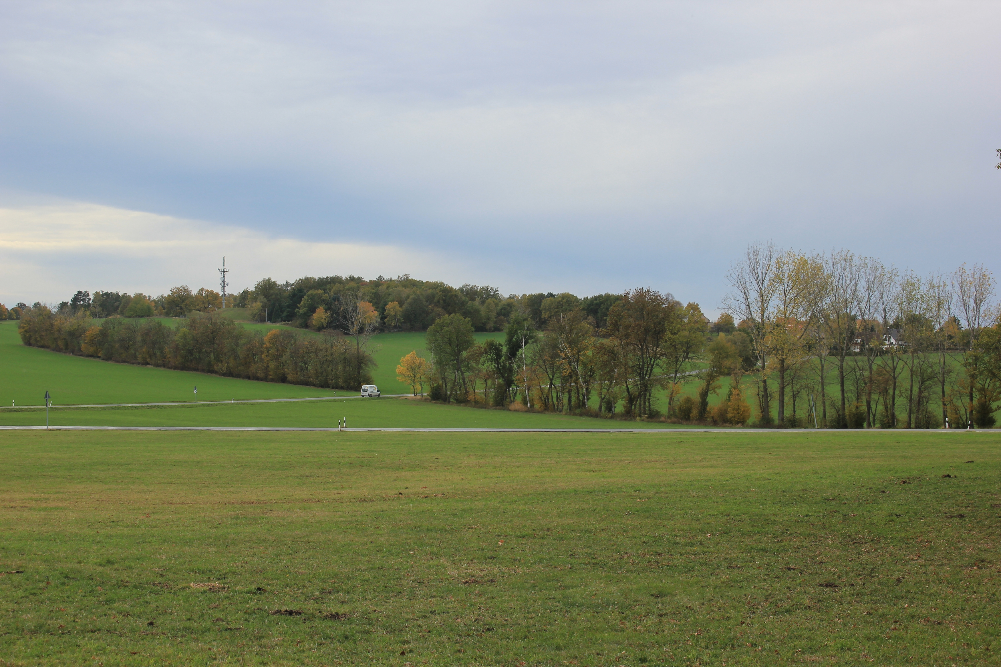 Hornjoserbsce: Napohlad Tchórja ze sewjera.